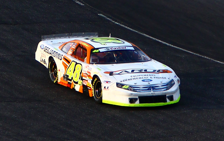 Karl Allard au Circuit Riverside Speedway Ste-Croix le 27 août 2011 - Photo Paul-Émile Poulin-Jacques